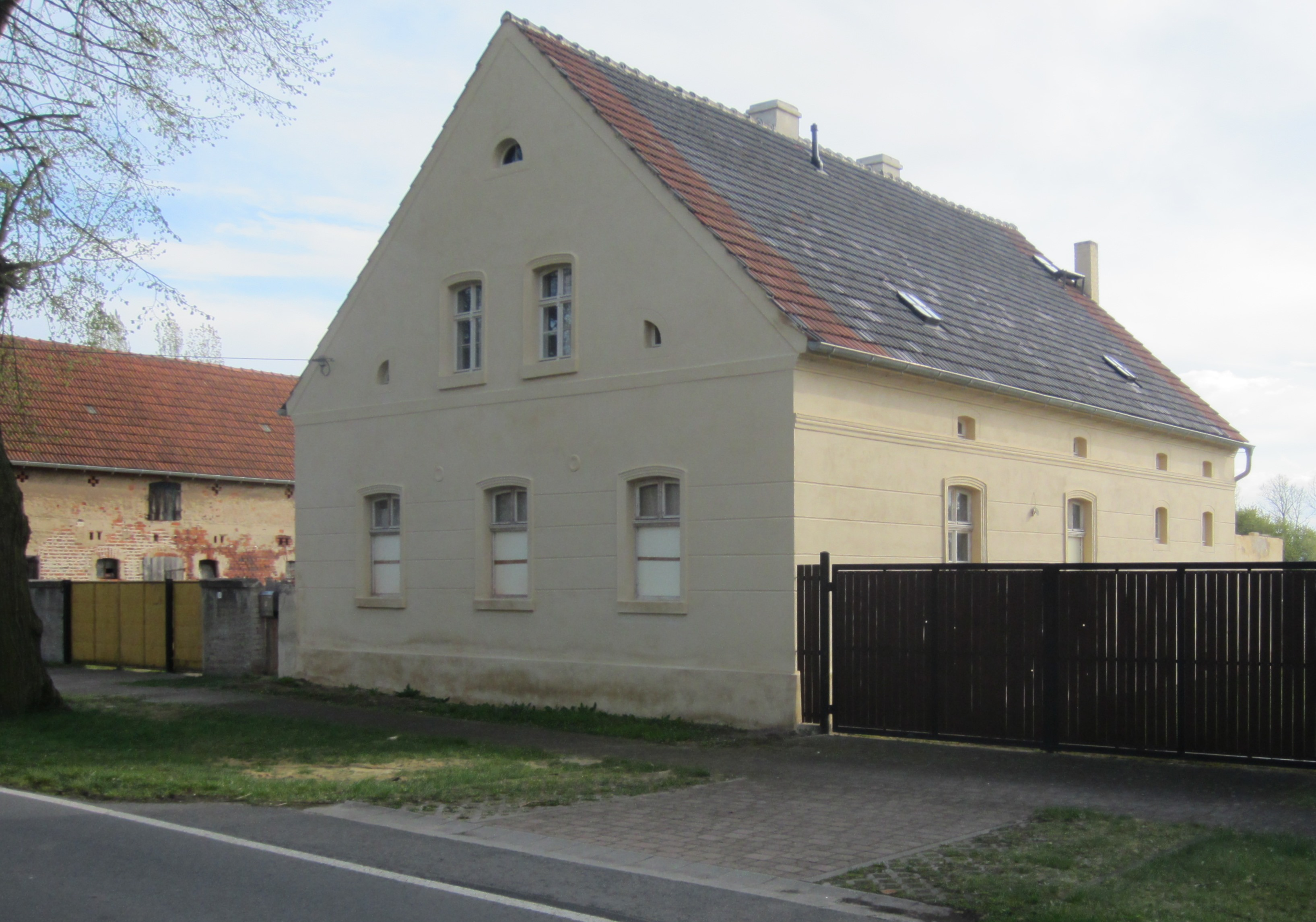 Falkenberg/Elster, Ortsteil Kleinrössen, denkmalgeschütztes Anwesen Dorfstraße 6, Ansicht von Nordosten.